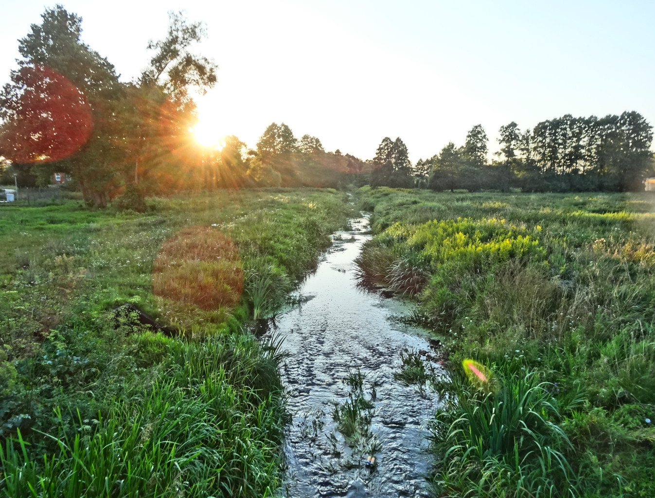 Noteć (Nowy Kanał Notecki) w Brzozie, gmina Nowa Wieś Wielka, powiat bydgoski